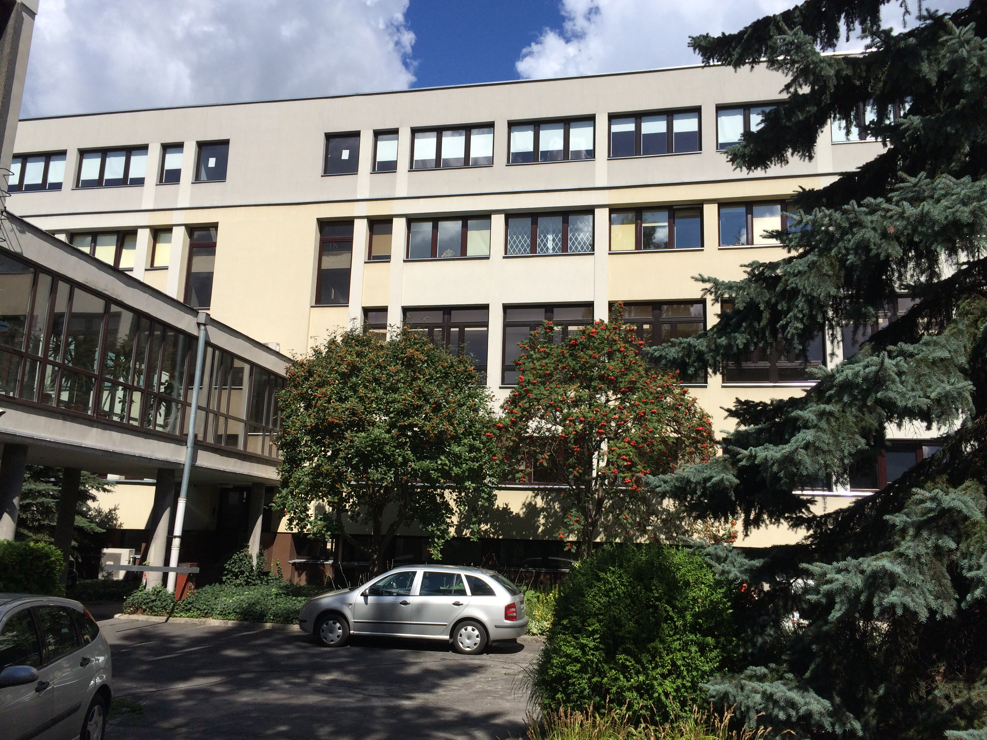 Budynek przy ul. Miodowej 21 w Warszawie, w którym znajduje się dziekanat i sale dydaktyczne Wydziału Pedagogicznego ChAT